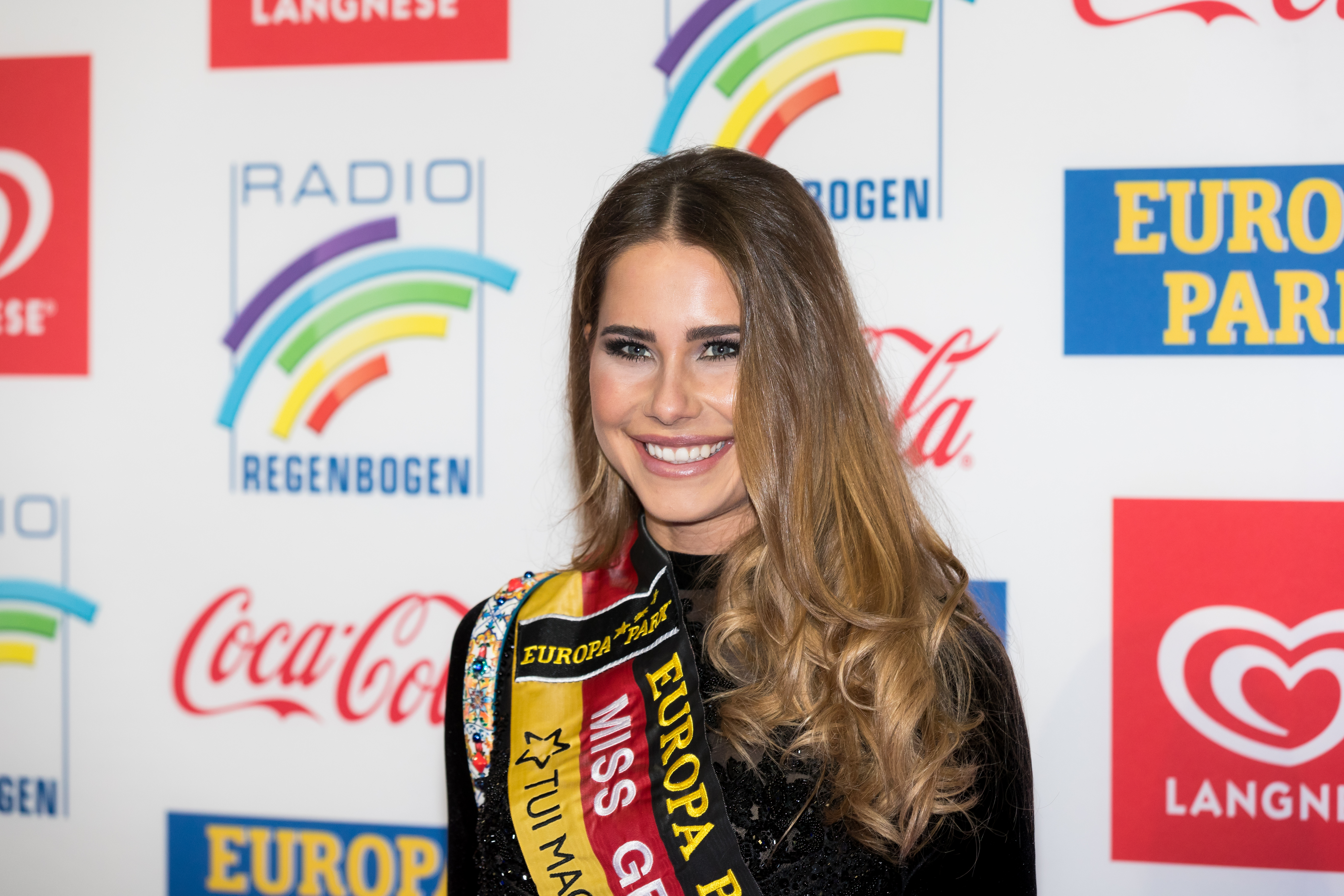 during Radio Regenbogen Award 2018 at Europapark, Rust, Baden-Württemberg, Germany on 2018-03-23, Photo: Sven Mandel